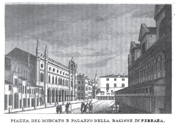 Il palazzo della Ragione a Ferrara prima dell'incendio del 1945. Illustrazione tratta da: Francesco Avventi, Il servitore di piazza: Guida per Ferrara, Ferrara Pomatelli, 1838, pp. 38-39